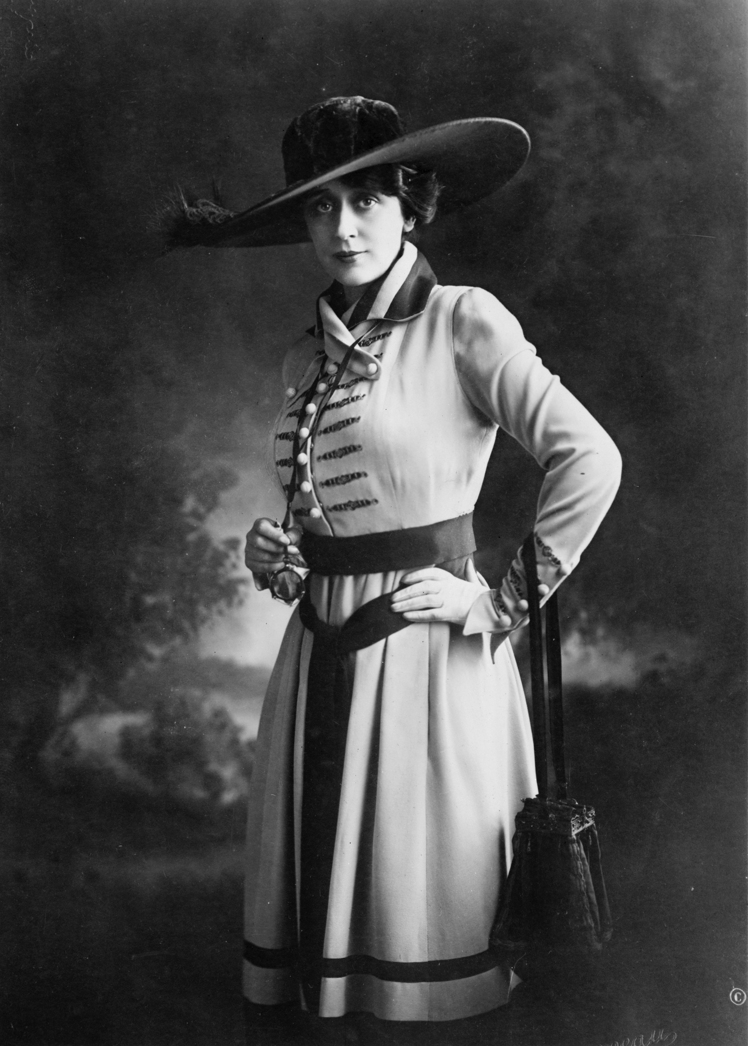 Actress Olga Petrova